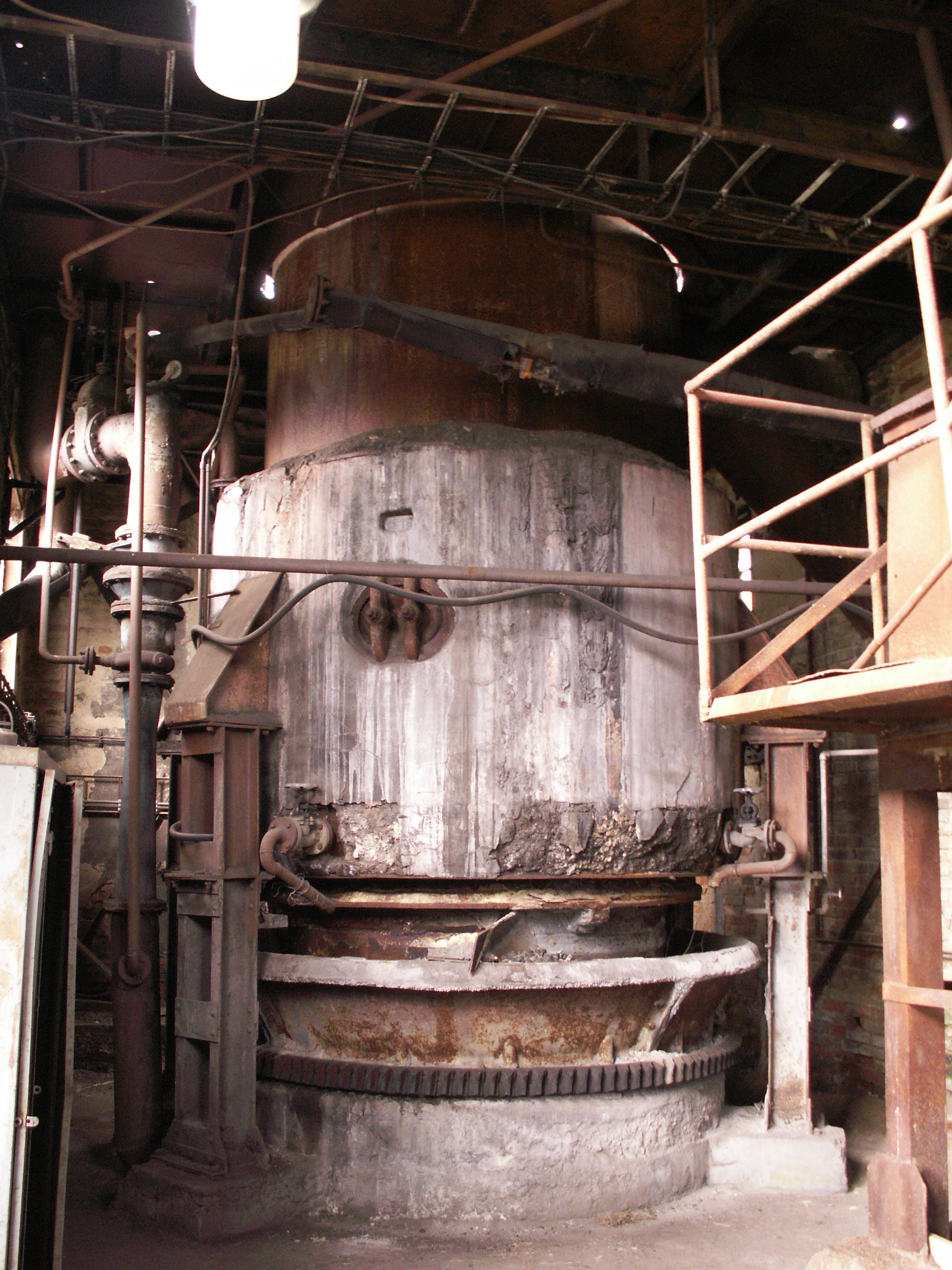 Bělá-Tasice, okres Havlíčkův Brod. Sklářská huť z konce 18. století, pohled na výrobu plynu z uhlí k topení v peci